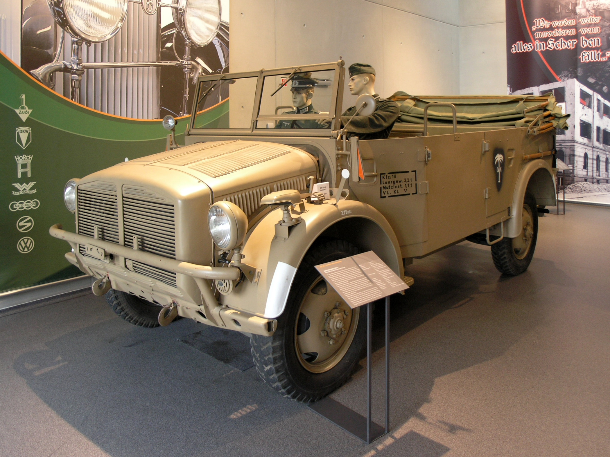 Schwerer PKW 108